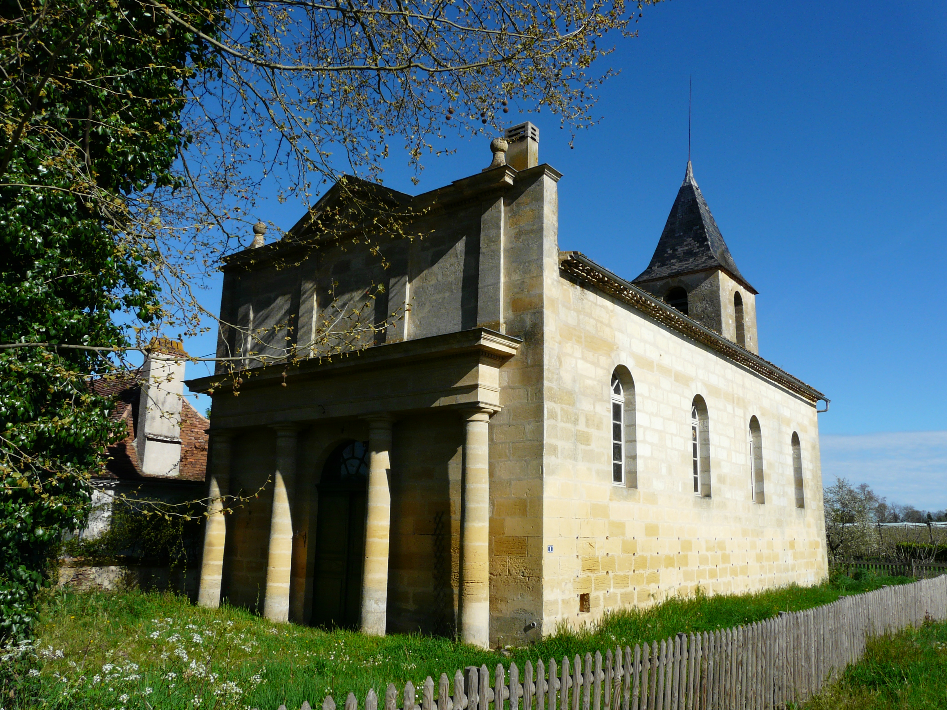 L'ancien temple protestant de Lamonzie-Saint-Martin, Dordogne, France.